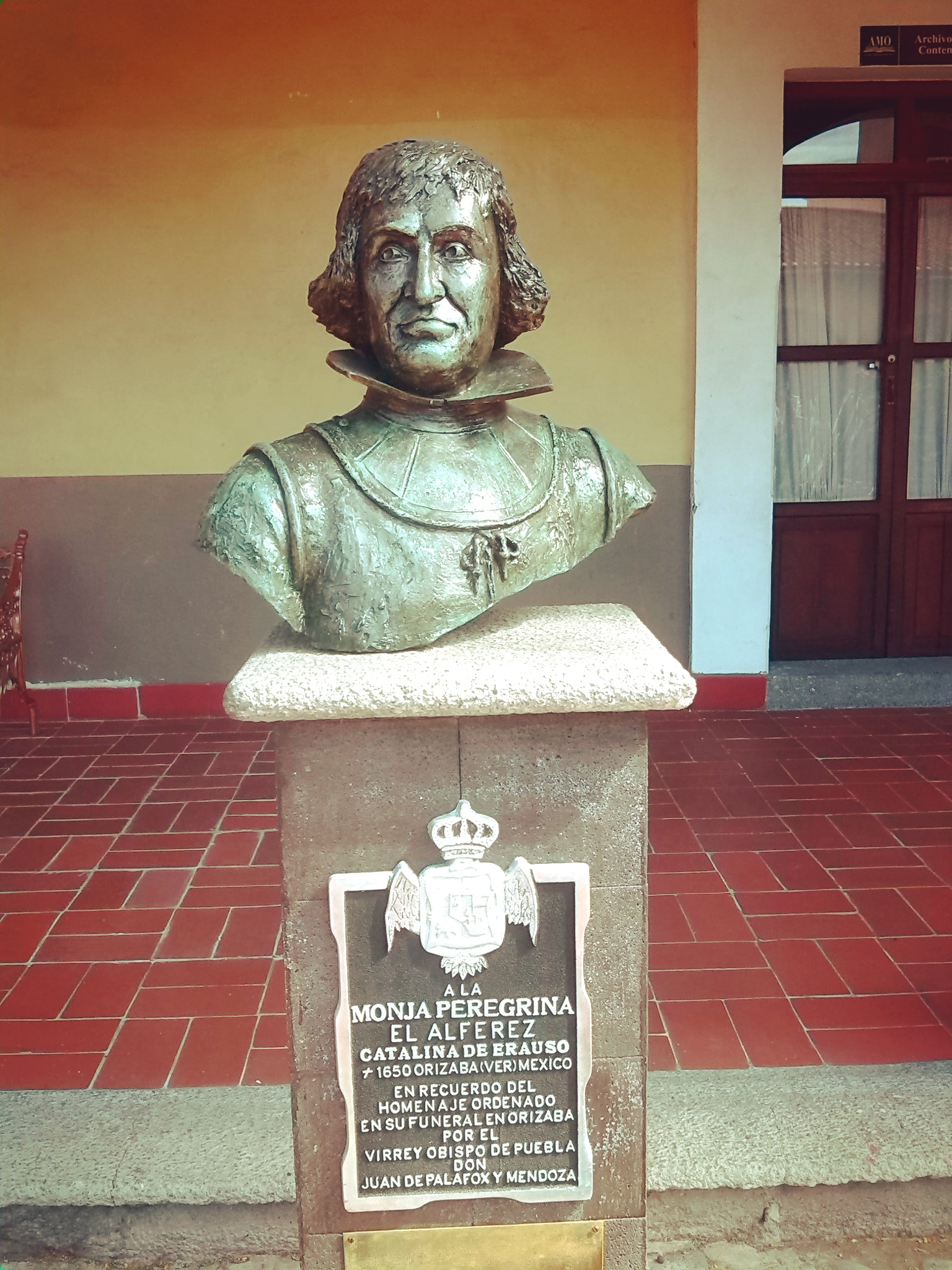 Monumento a la Monja Alférez en Orizaba, Veracruz